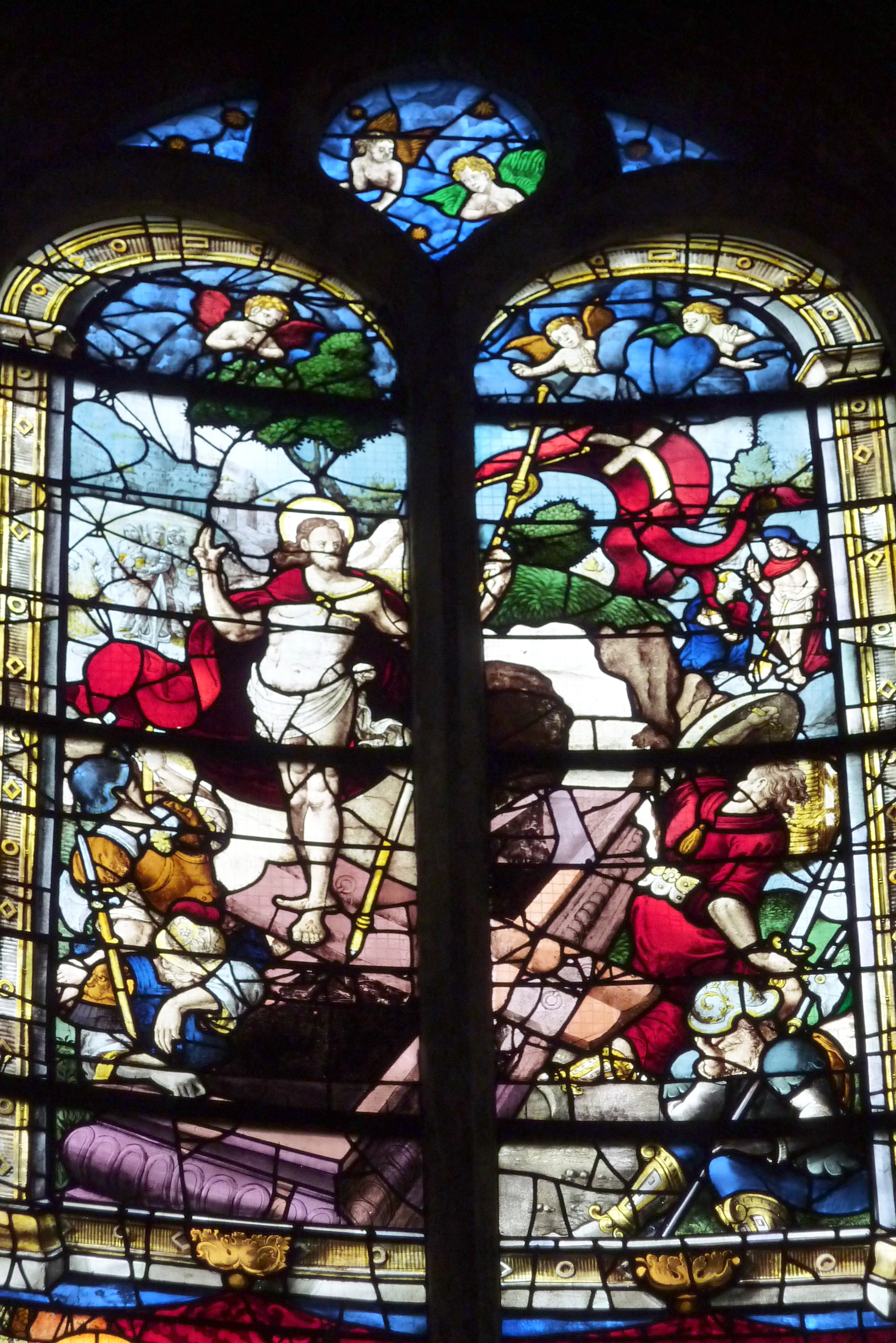 Chorfenster (Ausschnitt) von 1560/70 in der katholischen Pfarrkirche Saint-Martin in Groslay, Darstellung: Auferstehung, siehe Dominique Foussard, Charles Huet, Mathieu Lours: Églises du Val-d'Oise. Pays de France, Vallée de Montmorency, Société d'Histoire et d'Archéologie de Gonesse et du Pays de France, 2. Auflage, Gonesse 2011, ISBN 9782953155426